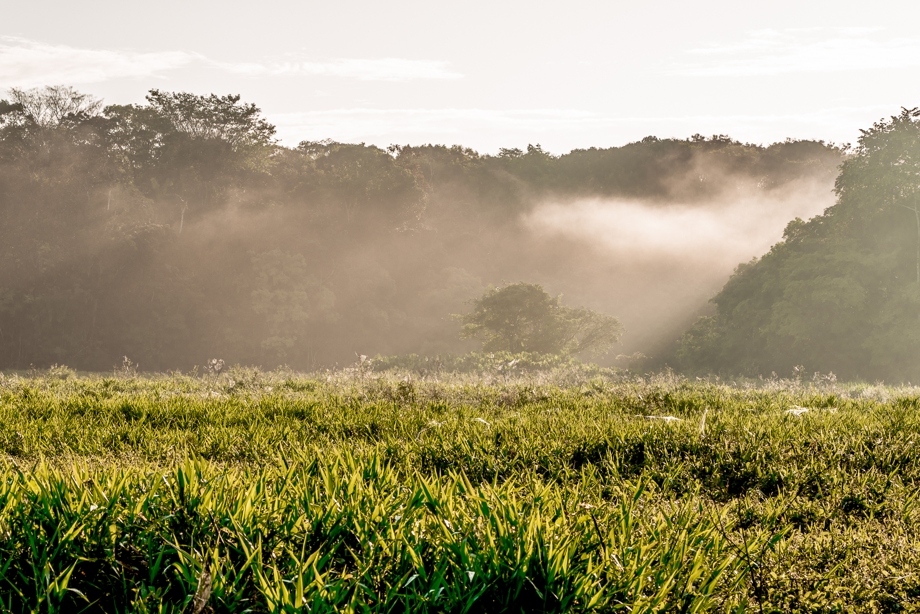 Cerração da manhã no Parque Estadual de Belém, cujo nome oficial é Parque Estadual do Utinga